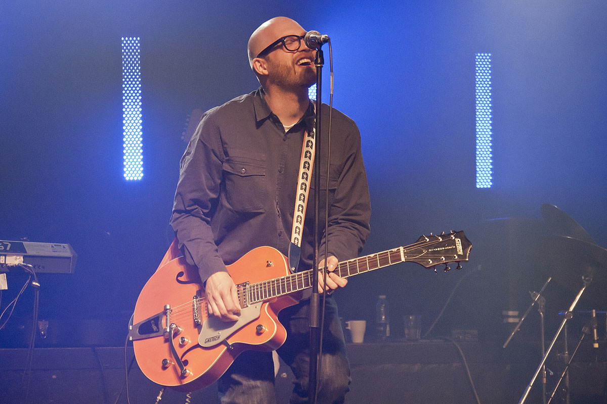 Pato Siebenhaar på spillestedet Forbrændingen, Albertslund, 22. marts 2012